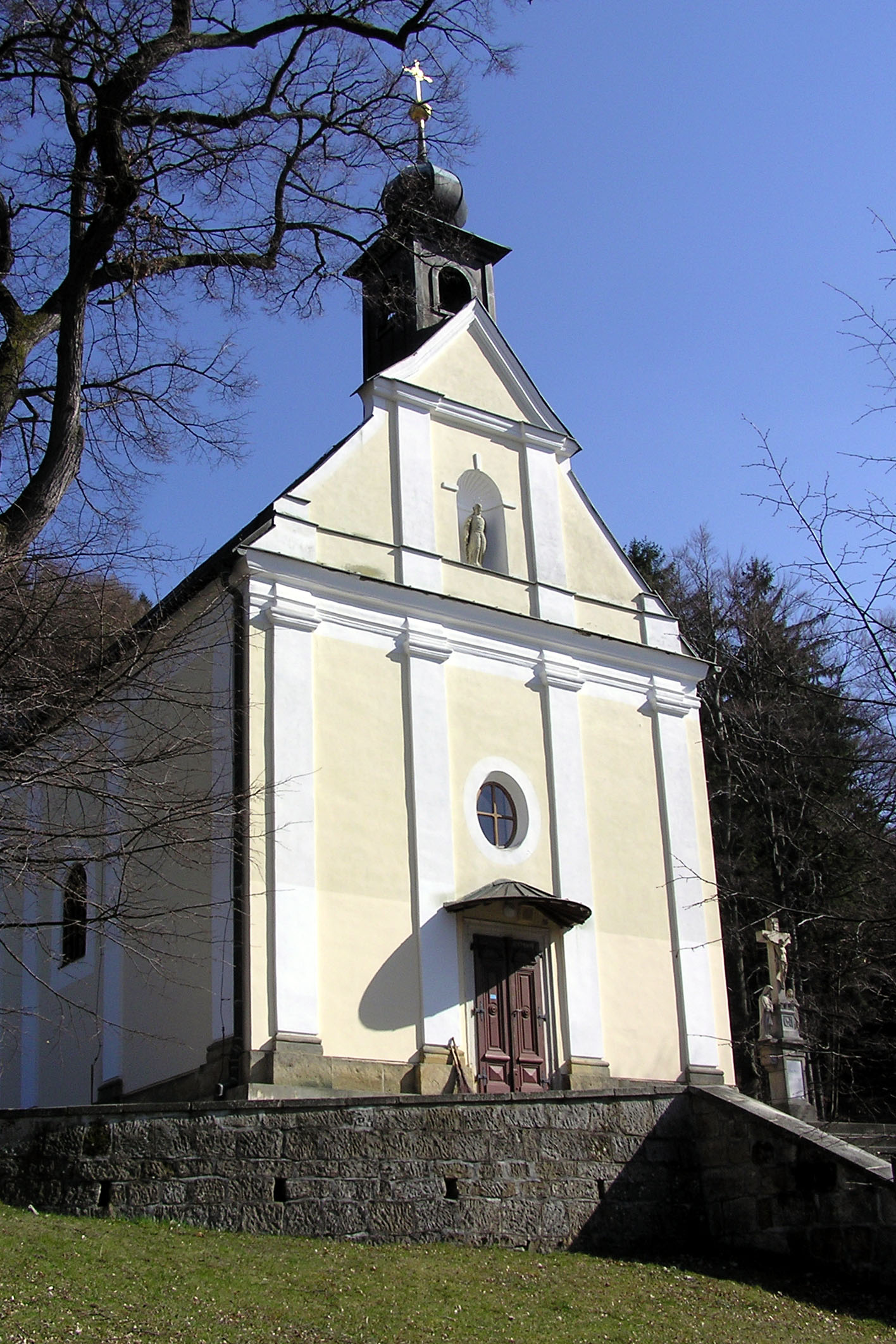 Malenisko - kostel Panny Marie Sněžné